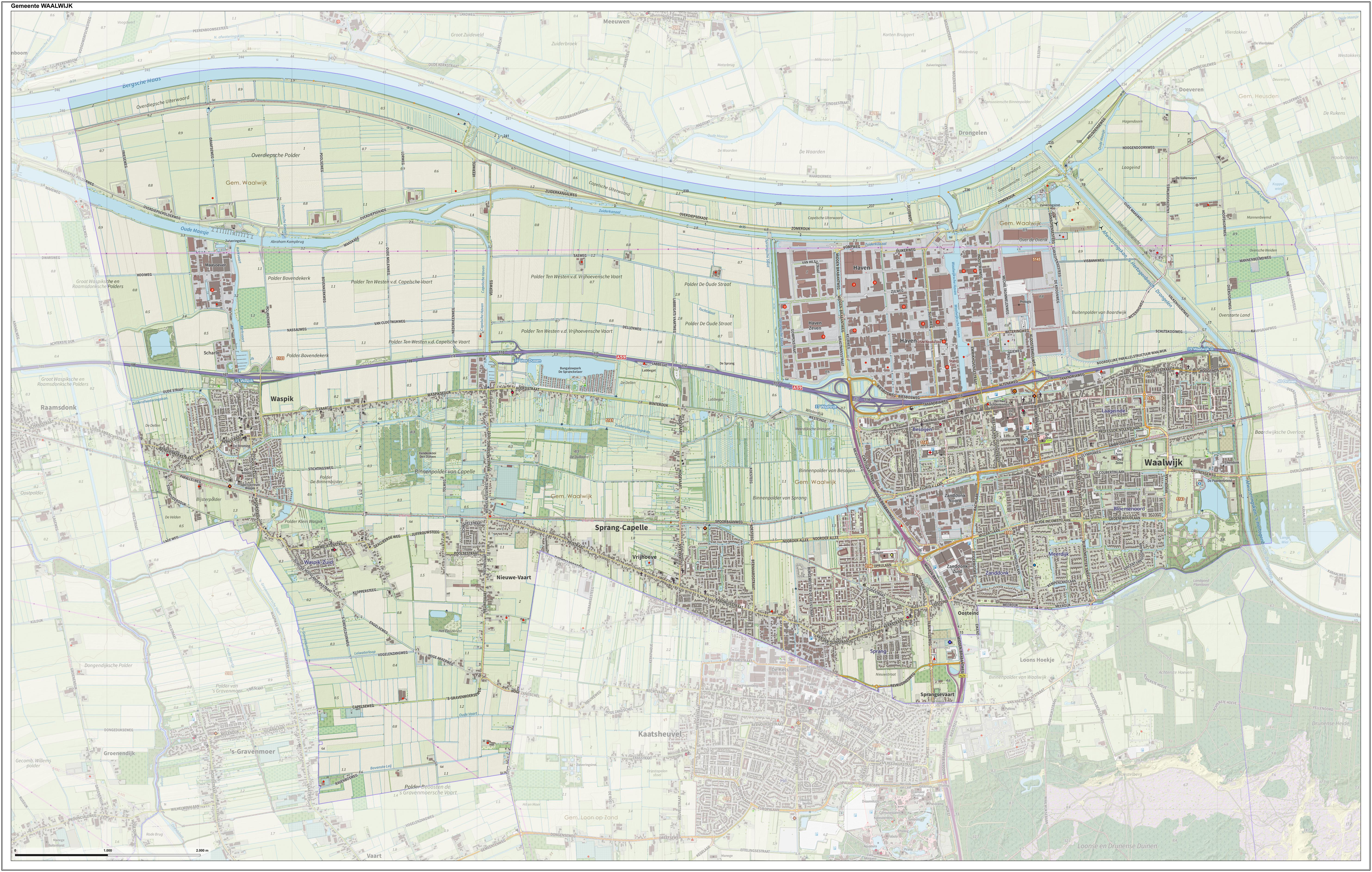 Topografische gemeentekaart. Resolutie: 400 pixels/km. Kaartbeeld samengesteld uit de open geodata van de Top10NL en Top25namen (Kadaster), Creative Commons-BY licentie. Gebouwvlakken uit open geodata BAG extract. Wegen uit de OpenStreetMap, OpenStreetMap community. Reliëfschaduw uit de Actuele Hoogtekaart AHN2. Samenstelling en kleurenschema: Jan-Willem van Aalst, met QGIS. Zie ook de Legenda.